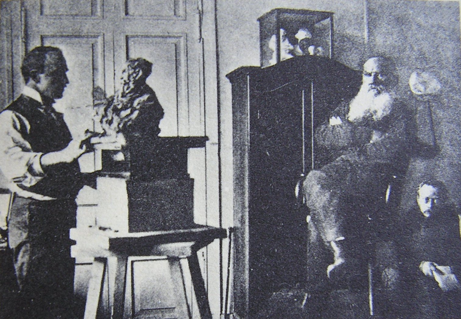 Lev N. Tolstoj posa per lo scultore Paolo Troubetzkoy. Seduto accanto a Tolstoj, lo scrittore Ivan I. Gorbunov-Posadov.